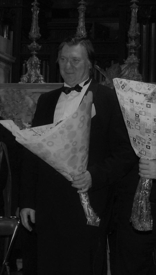 Claude Méloni, photo concert 2008